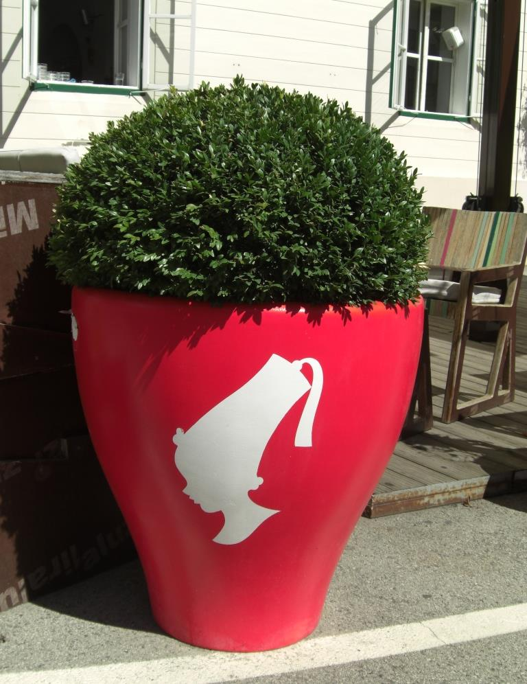 Der vom Grafikdesigner Joseph Binder entworfene „Meinl-Mohr“ auf einer Straße in Zagreb